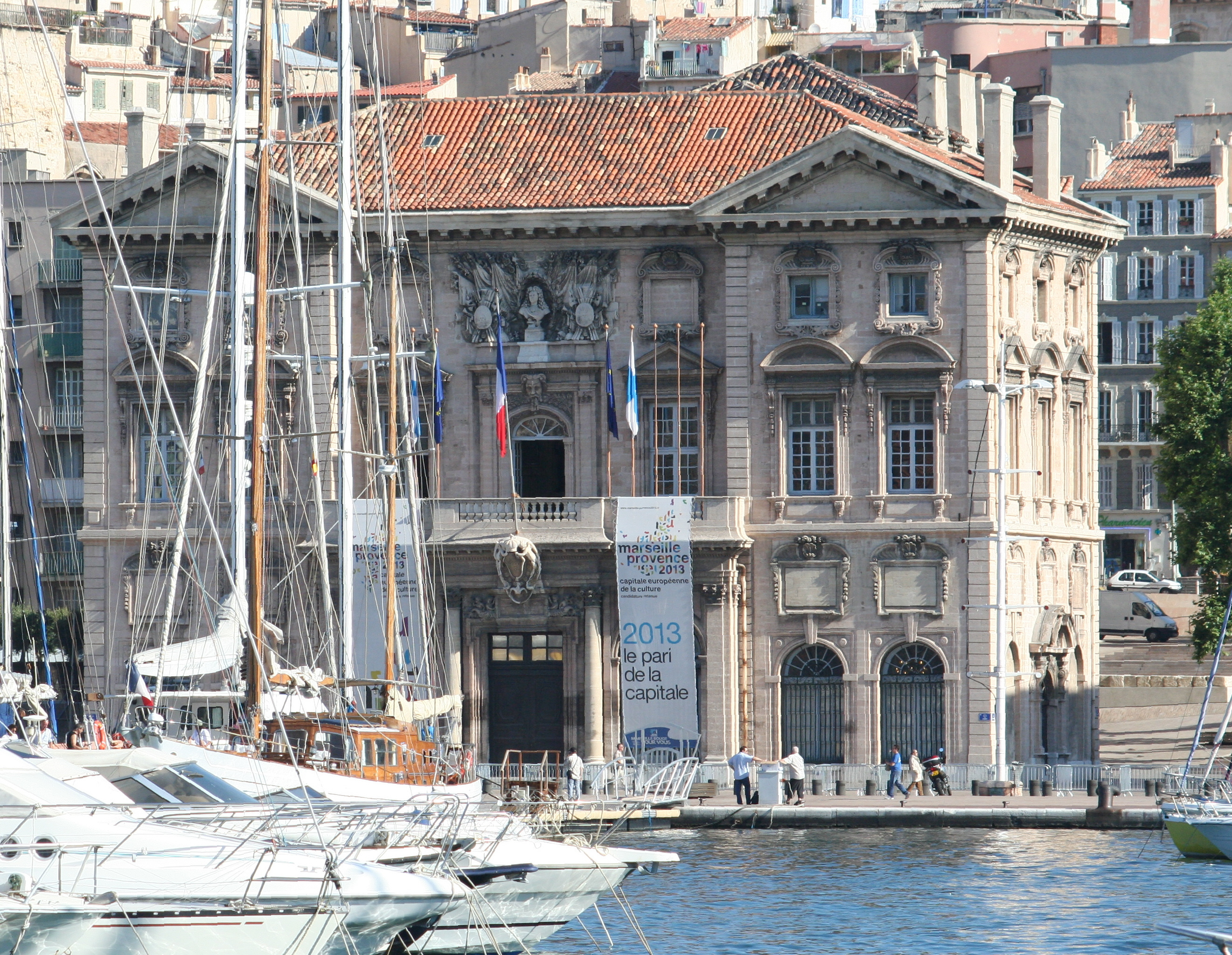 Hôtel de ville de Marseille, XVIIe siècle